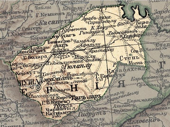 Шушинский уезд на карте Елисаветпольской губернии